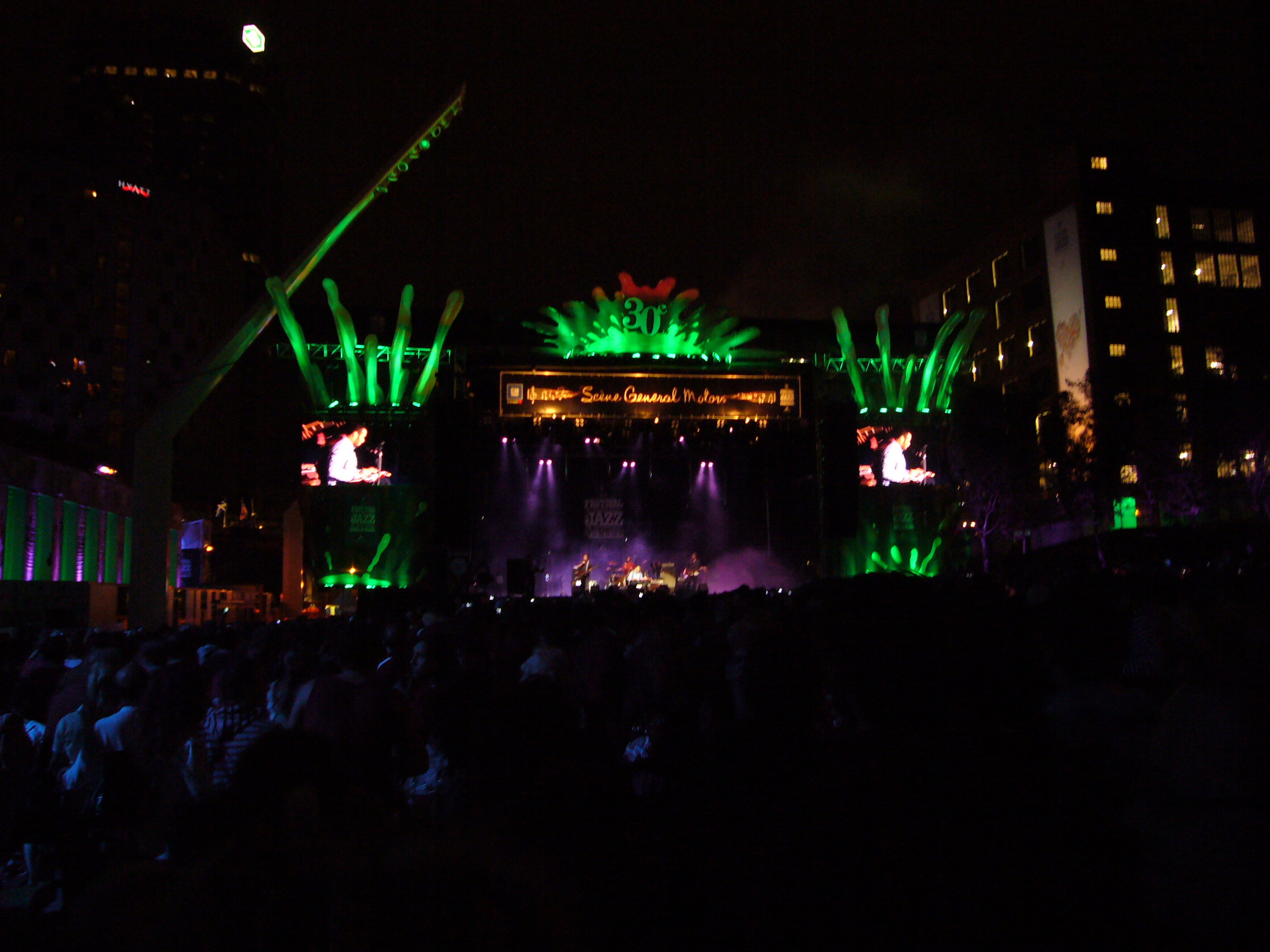 Photographie du concert de Ben Harper And Relentless7 lors de leur concert au 30è Festival International de Jazz de Montréal, sorti mars 2010 depuis en CD et DVD.